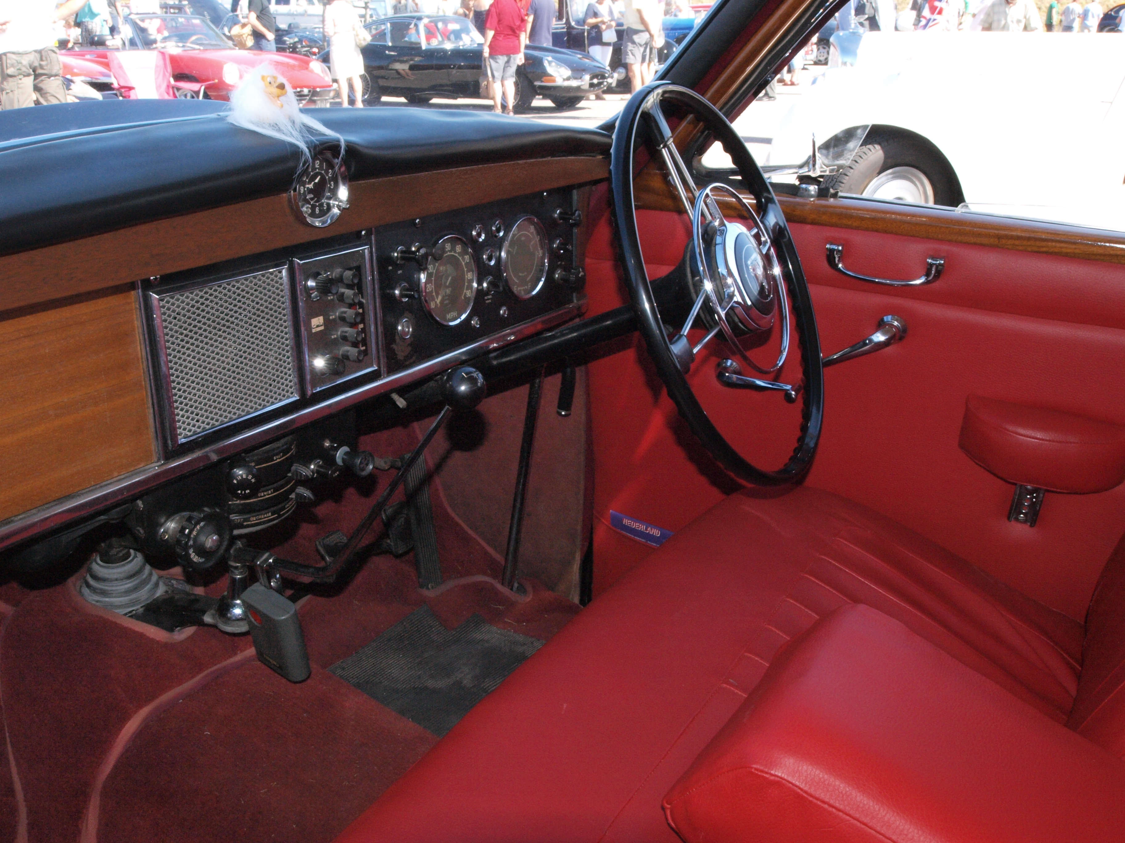 Rover P4 DM-45-59